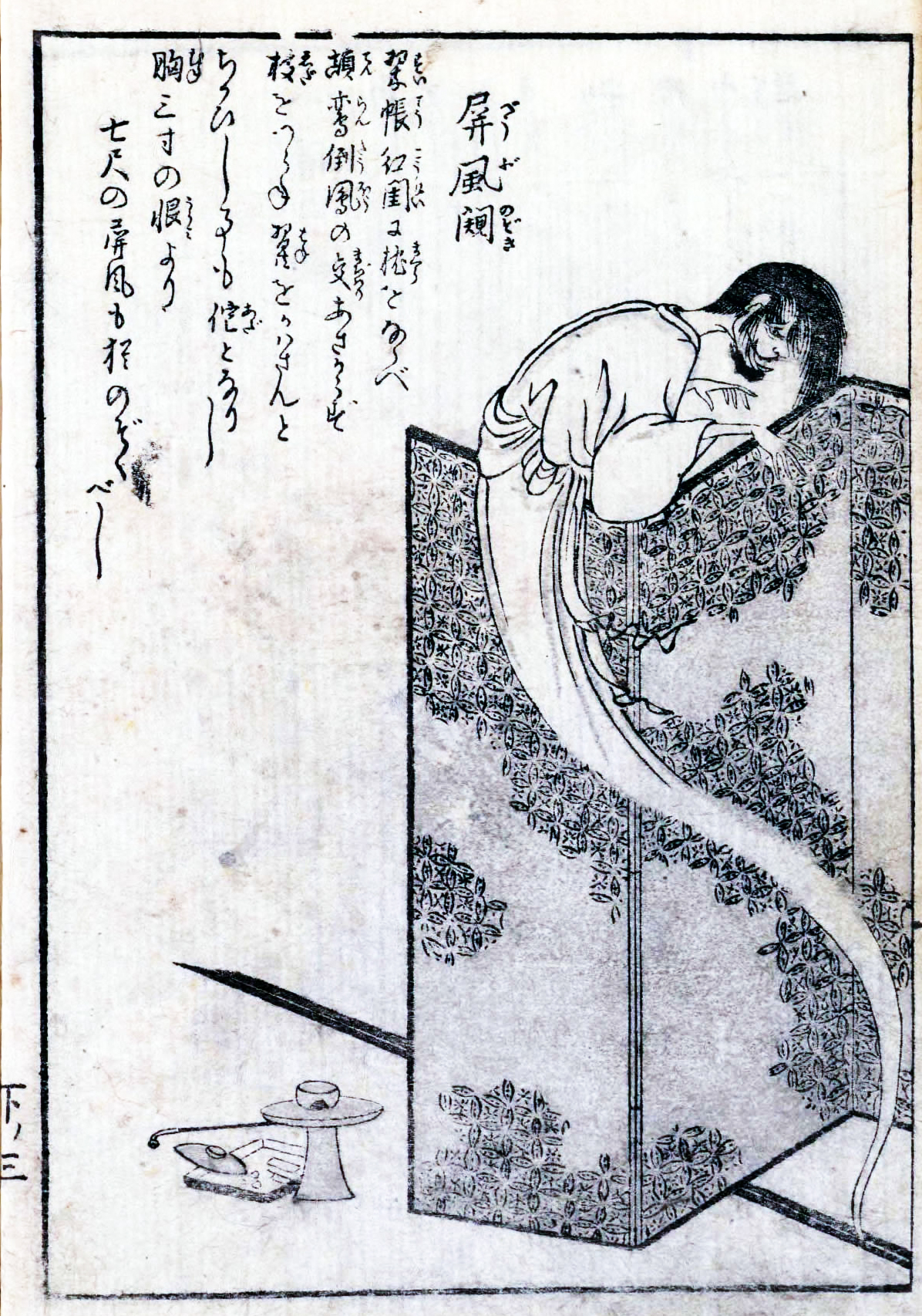 Byōbu-nozoki (屏風覗) from the Konjaku Hyakki Shūi (今昔百鬼拾遺)